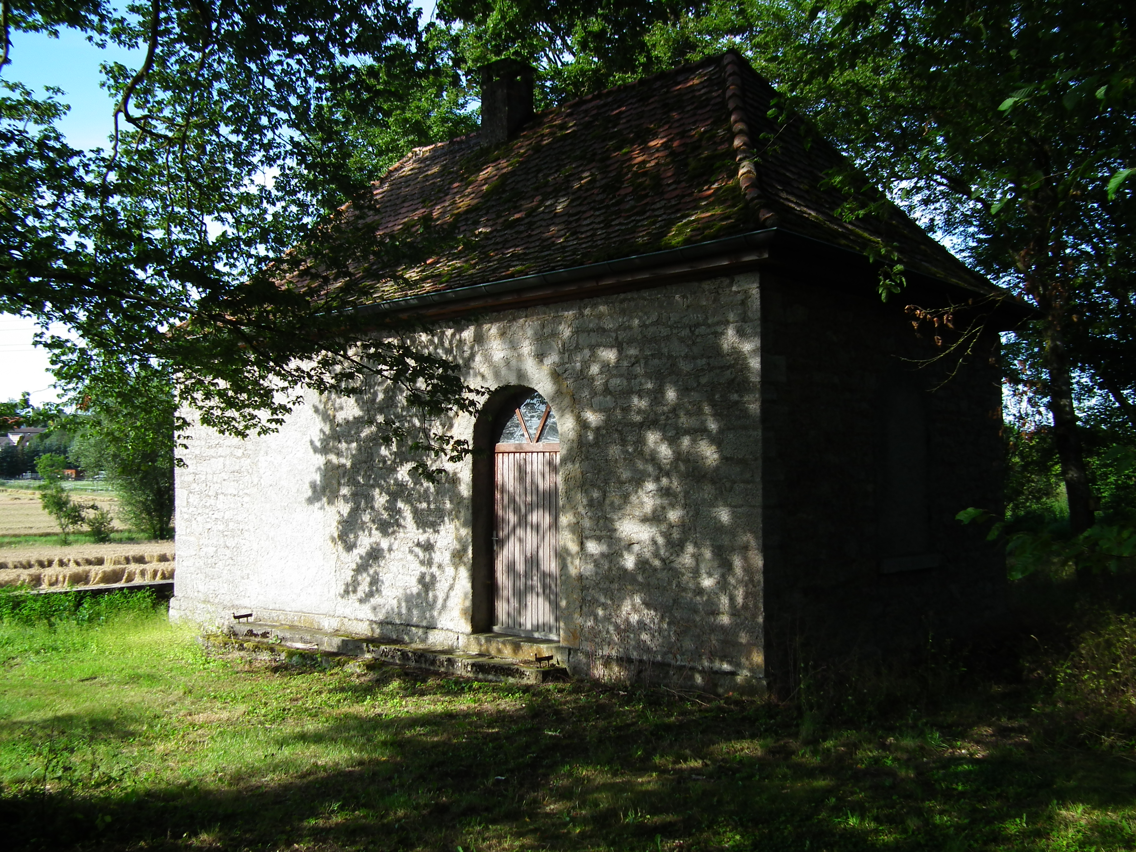 Jüdischer Friedhof Allersheim